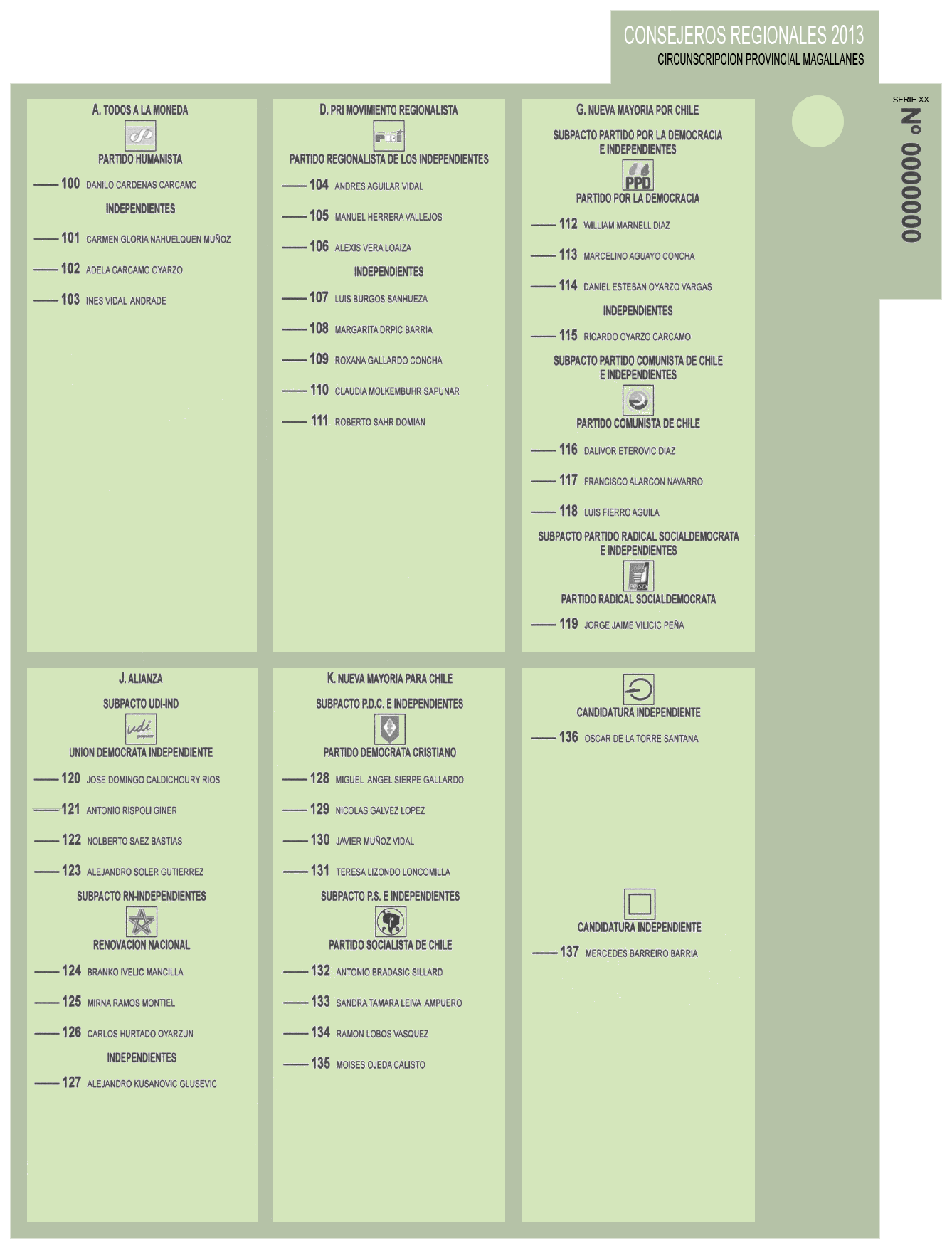 Reproducción de la cédula de votación empleada en la elección de consejeros regionales de 2013 en la provincia chilena de Magallanes.